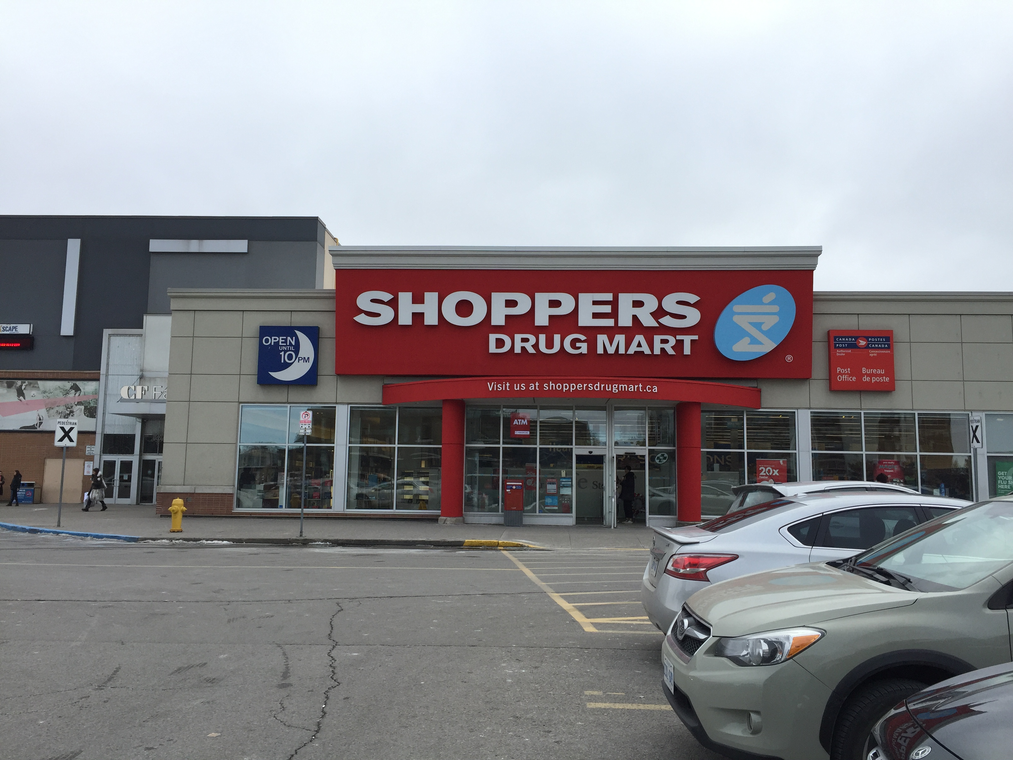 کوردی: شاپەرز درەگ مارت لە نۆرس یۆرک تۆرەنتۆ